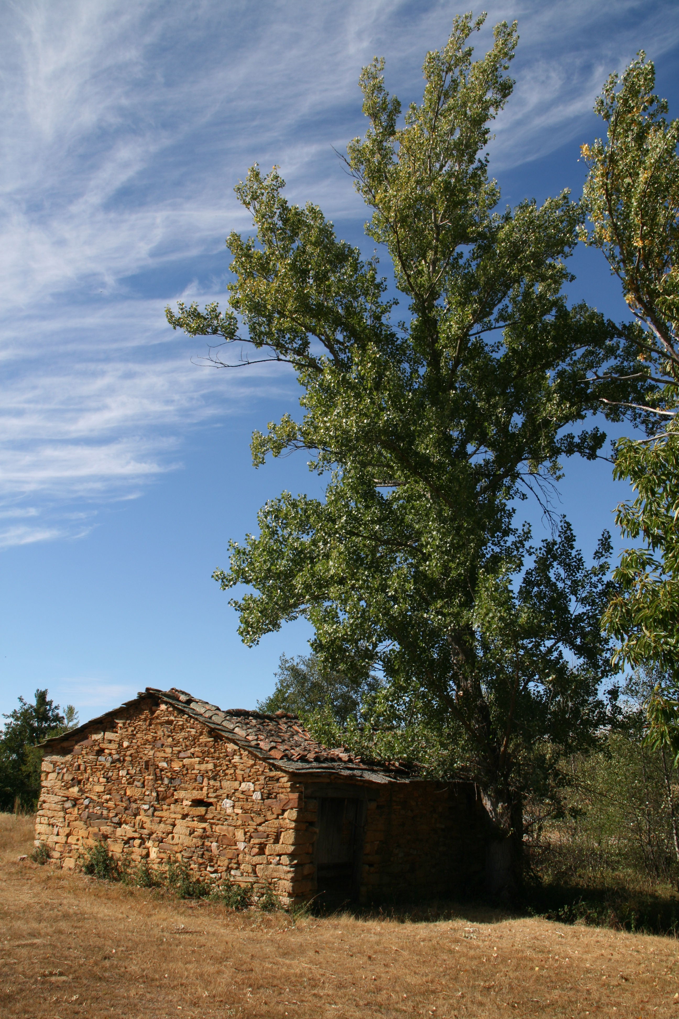 Molino - Rebotina - Pobladura de Aliste - Zamora